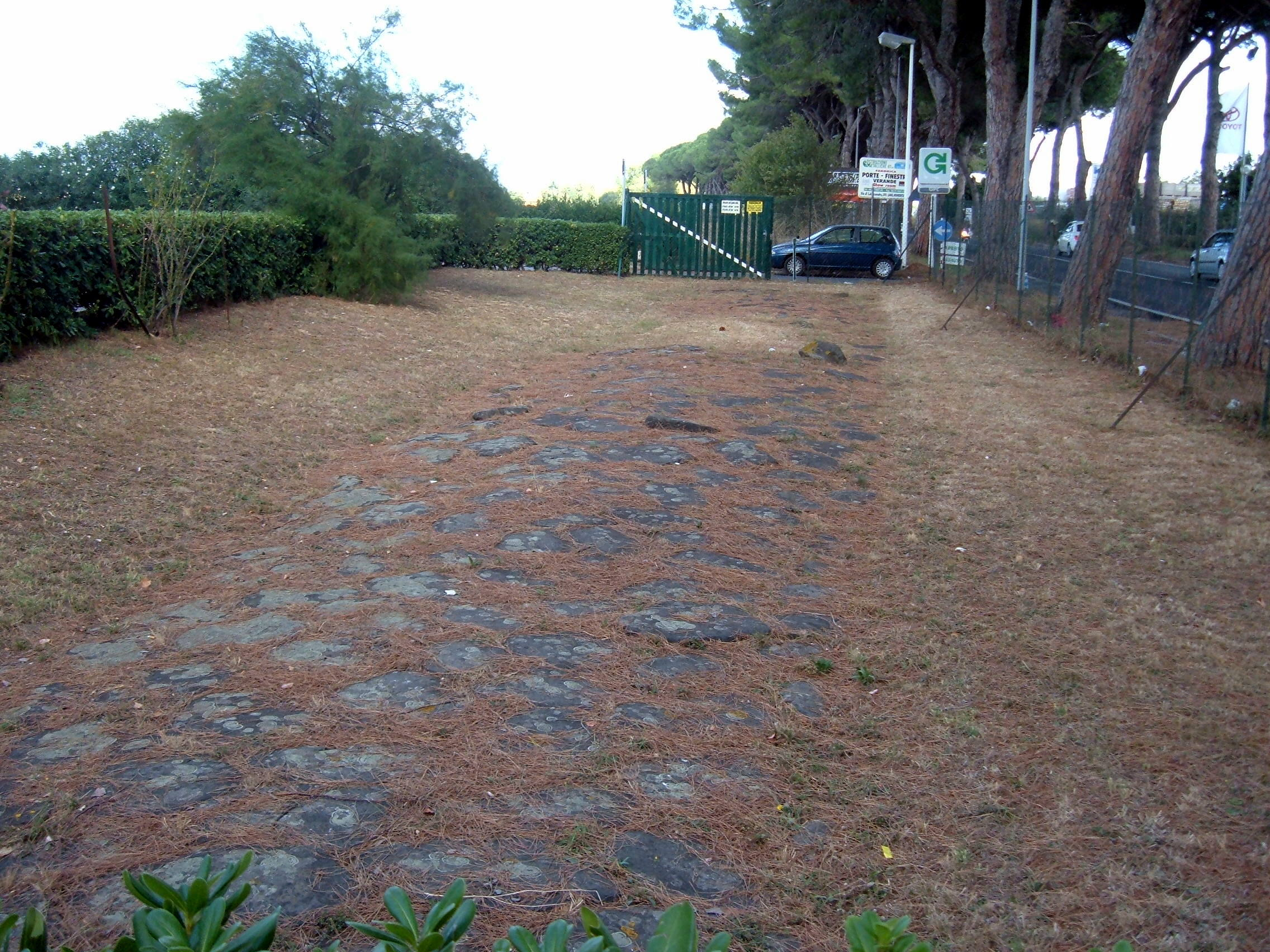 Resti del tracciato antico della via Nomentana, in località Sant'Alessandro.